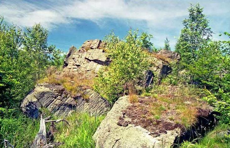 skály na úbočí kopce Wolek autor:Zp